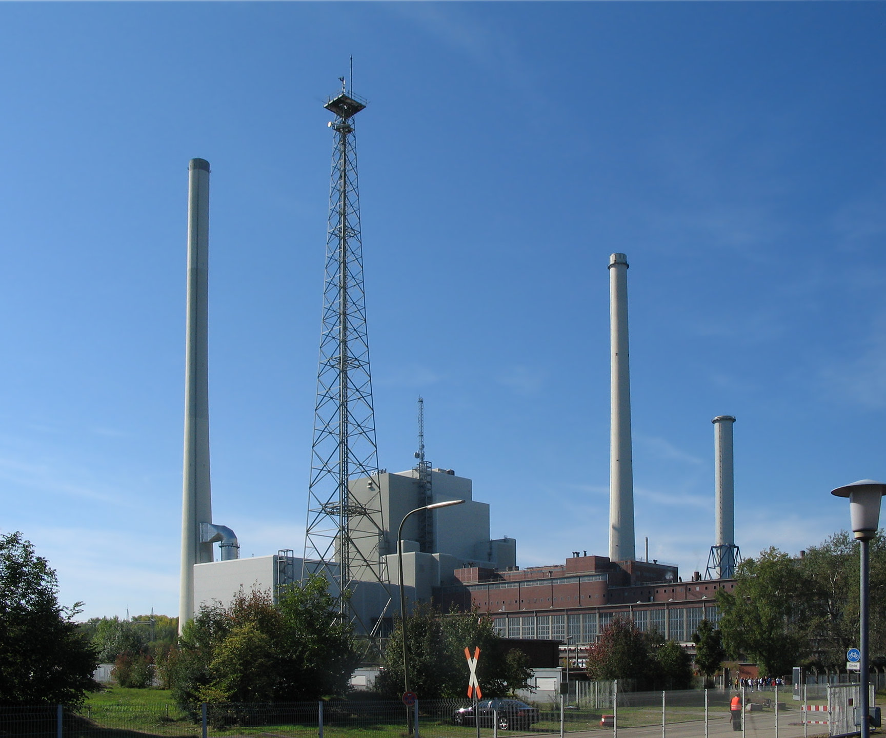 Rheinhafen-Dampfkraftwerk Karlsruhe